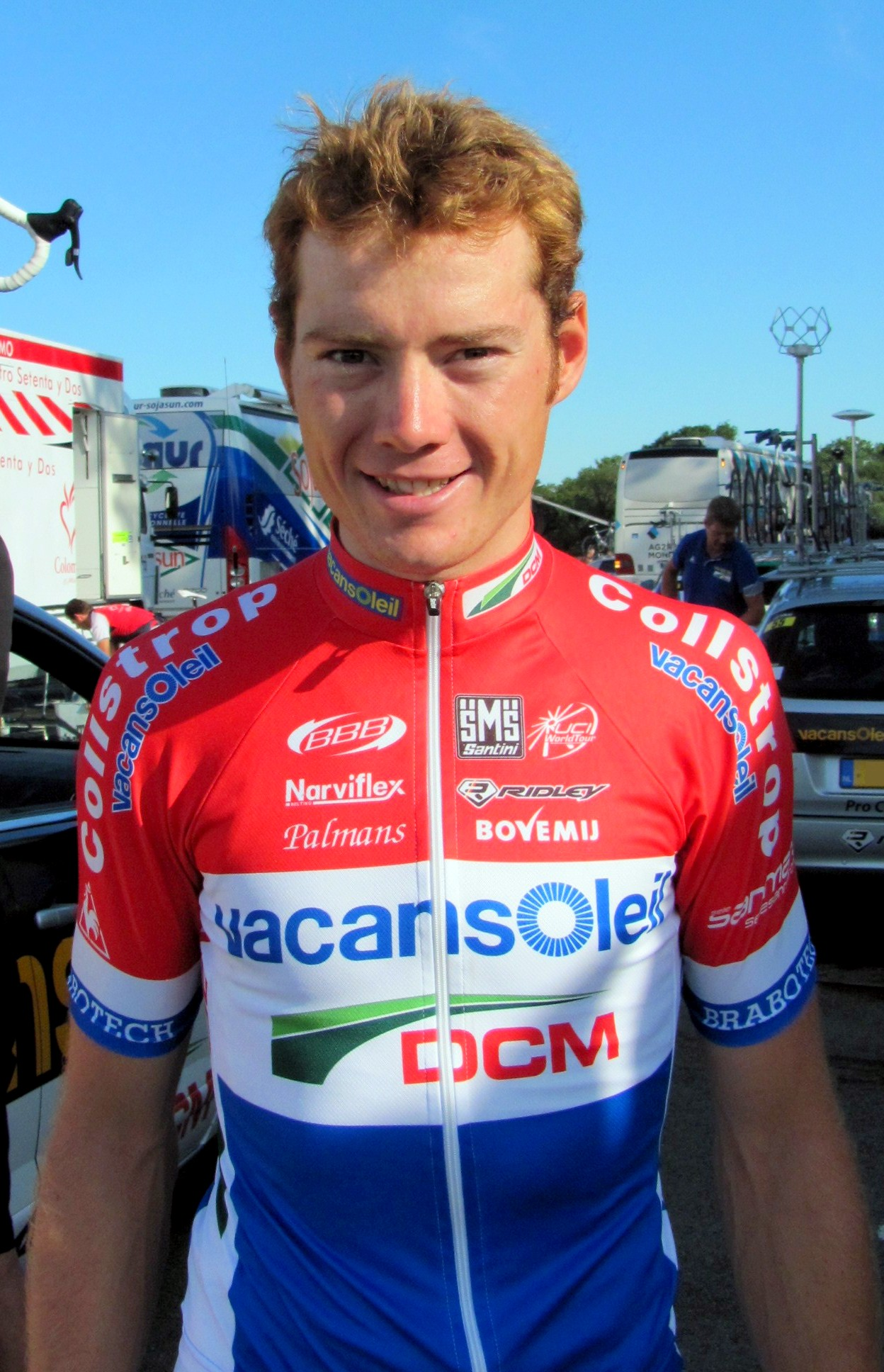 Pim Ligthart au soir de la 2e étape du Tour de l'Ain 2011 vêtu de son maillot de champion des Pays-Bas sur route 2011 ; hôtel Lyon-est (à Saint-Maurice-de-Beynost) où sont hébergés la grande majorité des coureurs, pendant le Tour de l'Ain.